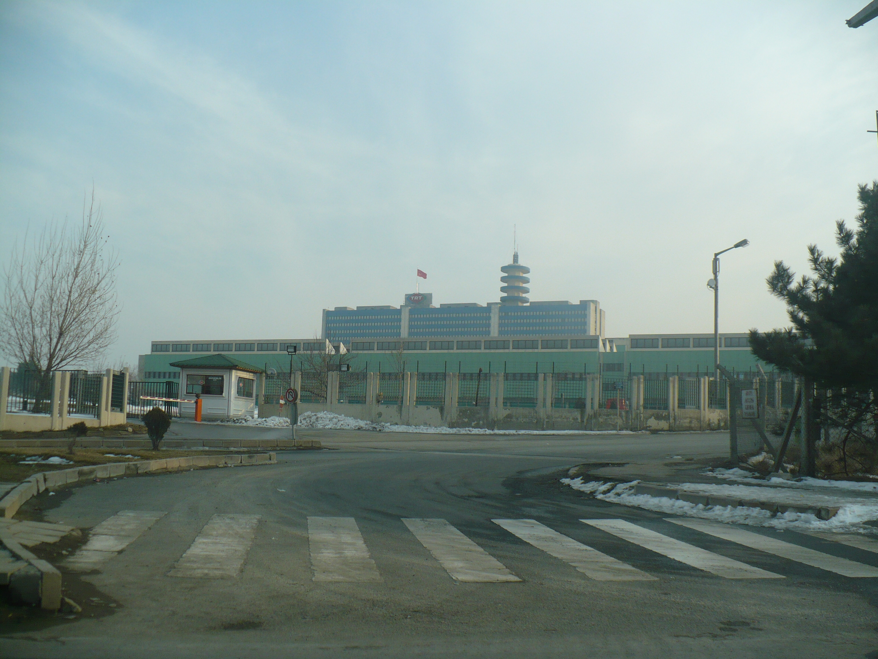 TRT Merkez Binası ORAN/Ankara